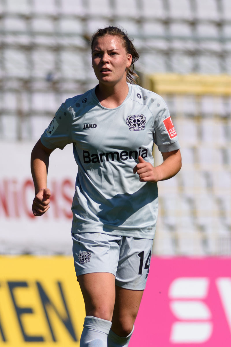 Juliane Wirtz during the Bundesliga match vs FC Bayern